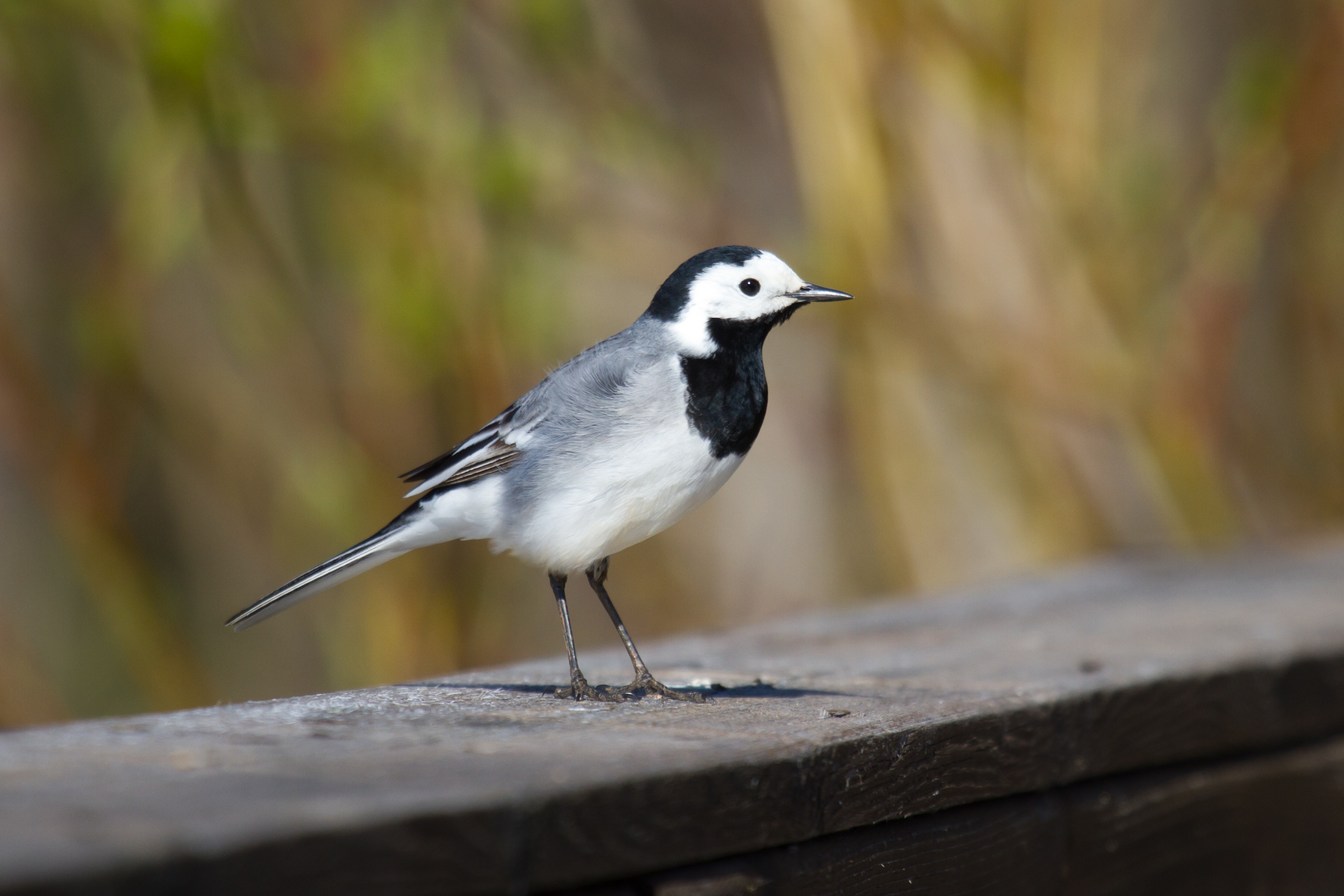 White Wagtail - Motacilla alba: Male, ssp. alba.